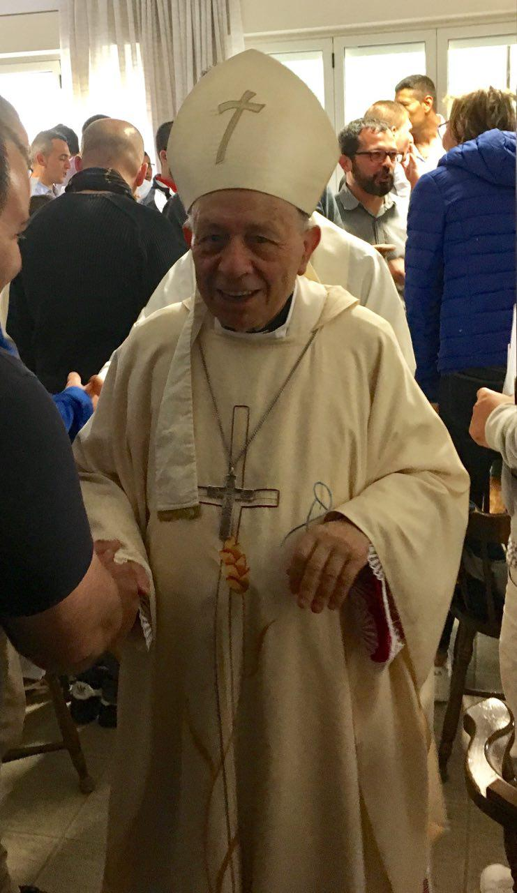 L'Arcivescovo Antonio Cantisani presso la Comunità dei Tossico Dipendenti del Centro Calabrese di Solidarietà in occasione del giovedì santo del 2017